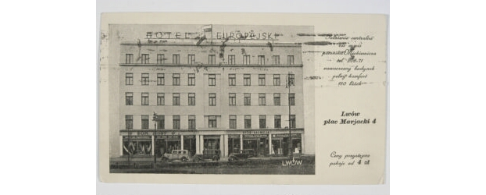 Марійська площа